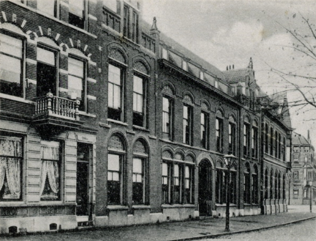 Nieuw Israëlitisch Weeshuis aan de Mathenesserlaan (niet aan de 's-Gravendijkwal zoals vermeld staat). Op 26 april 1898 werd het weeshuis van de Israëlitische Gemeente geopend.